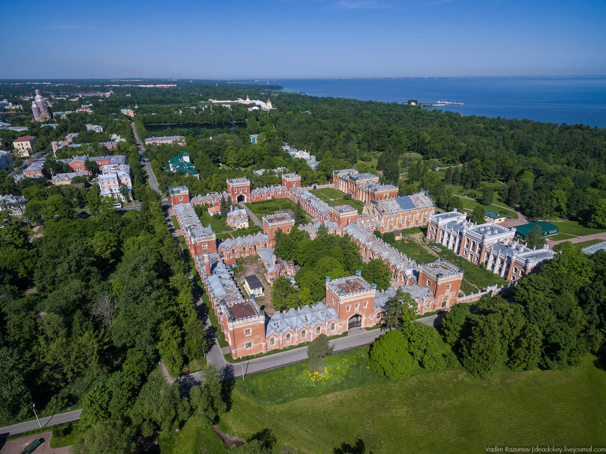 Дворцово-парковый ансамбль Петродворца (Государственный музей-заповедник Петергоф): Александрийское шоссе, Правленская улица, Санкт-Петербургский проспект, Разводная улица, улица Морского Десанта, южный берег Финского залива, Петергоф, Петродворцовый район, Санкт-Петербург Здание главных императорских конюшен в Петергофе, выстроено в 1847-52 гг. по проекту академика Н. Бенуа.